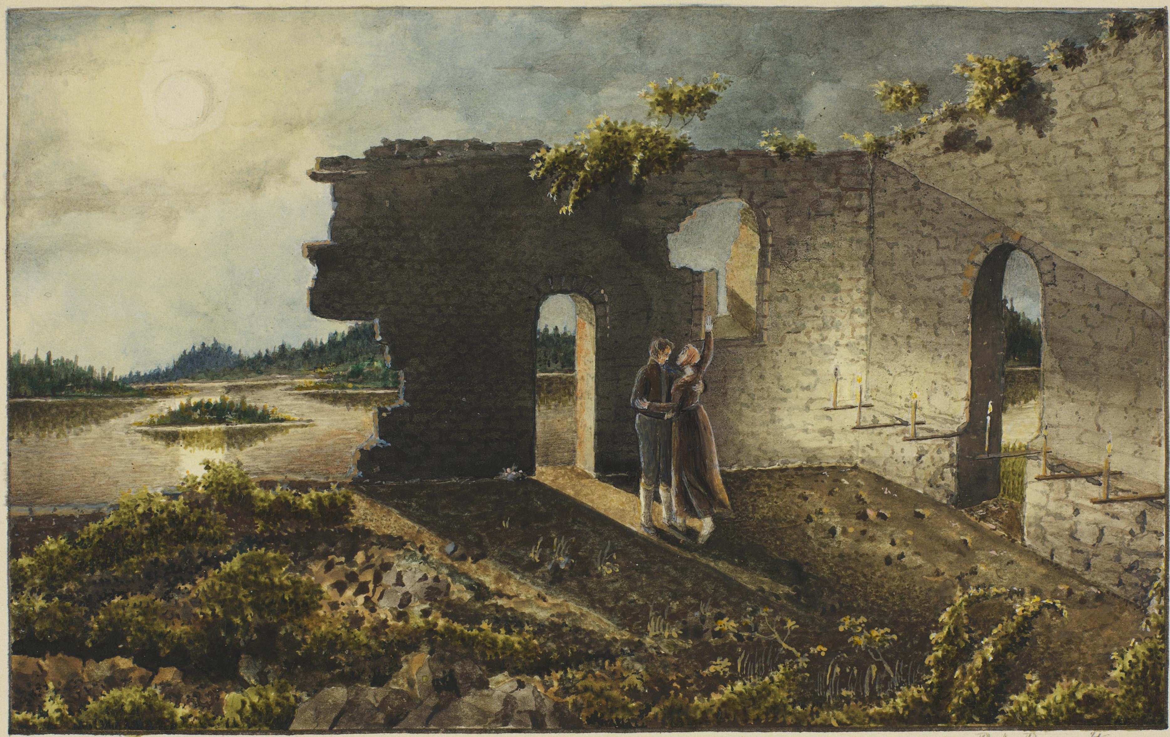 Illustrasjon hentet fra et privatarkiv i Nasjonalbiblioteket med tittelen "Ruinerne af Marriddals Kirke paa Kirkeby" av Peter Andreas Brandt.